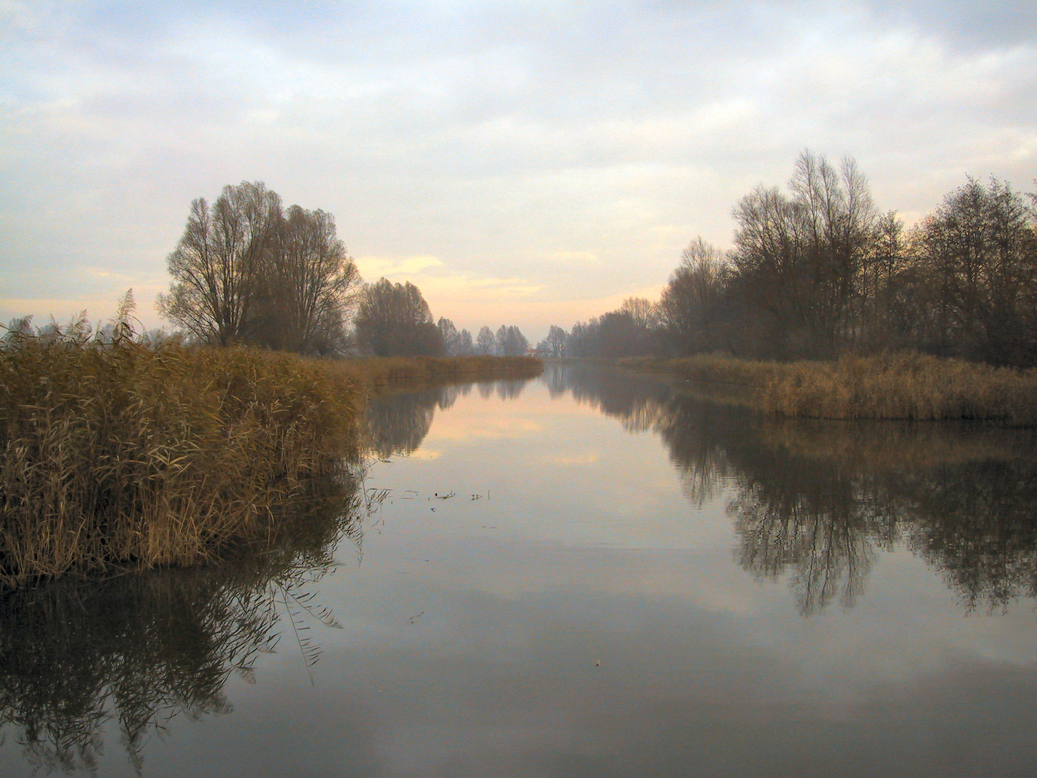 Devel near Kijfhoek, The Netherlands